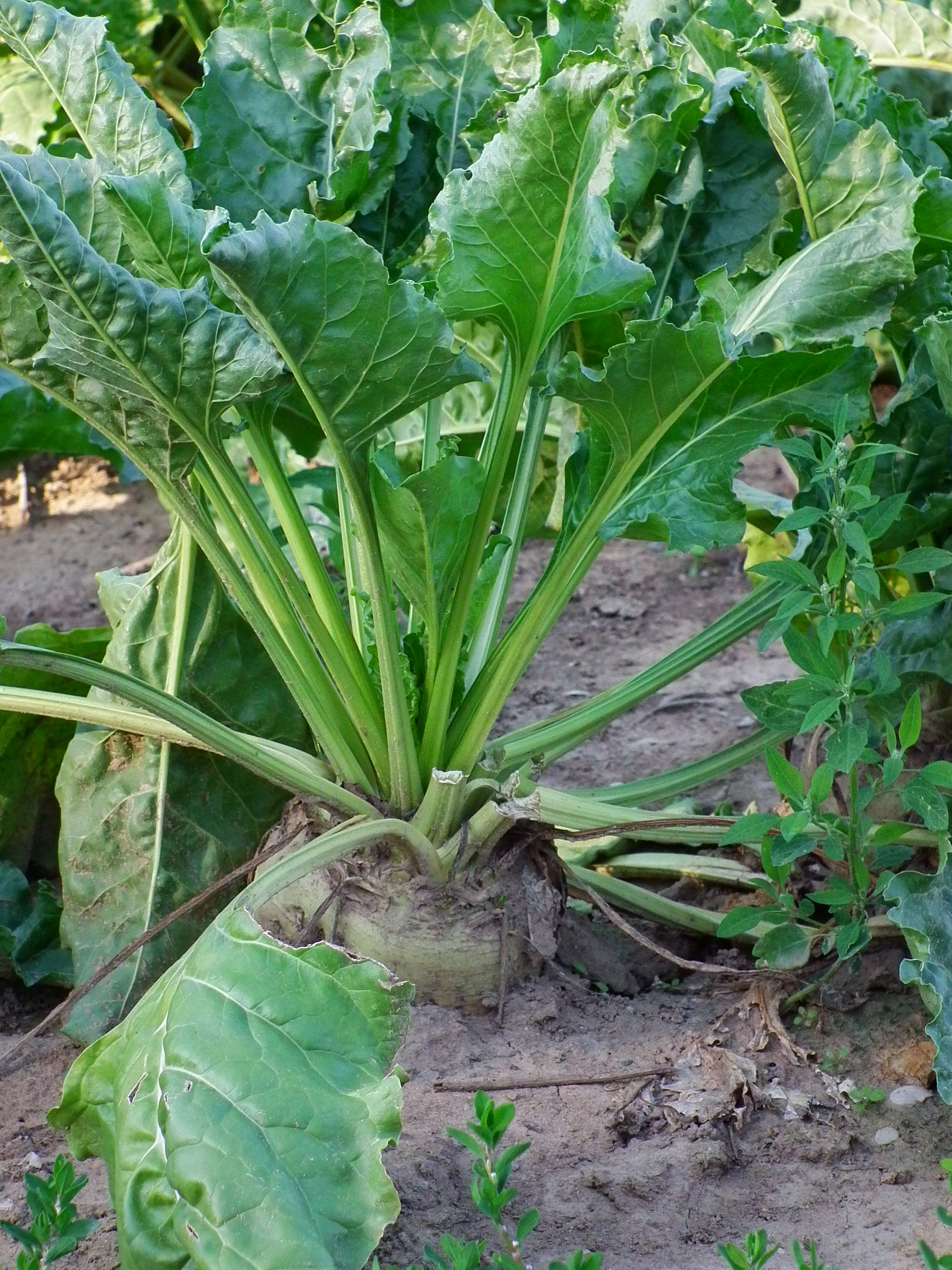 Zuckerrübe, fotografiert auf einem Feld im nördlichen Baden-Württemberg (Deutschland)